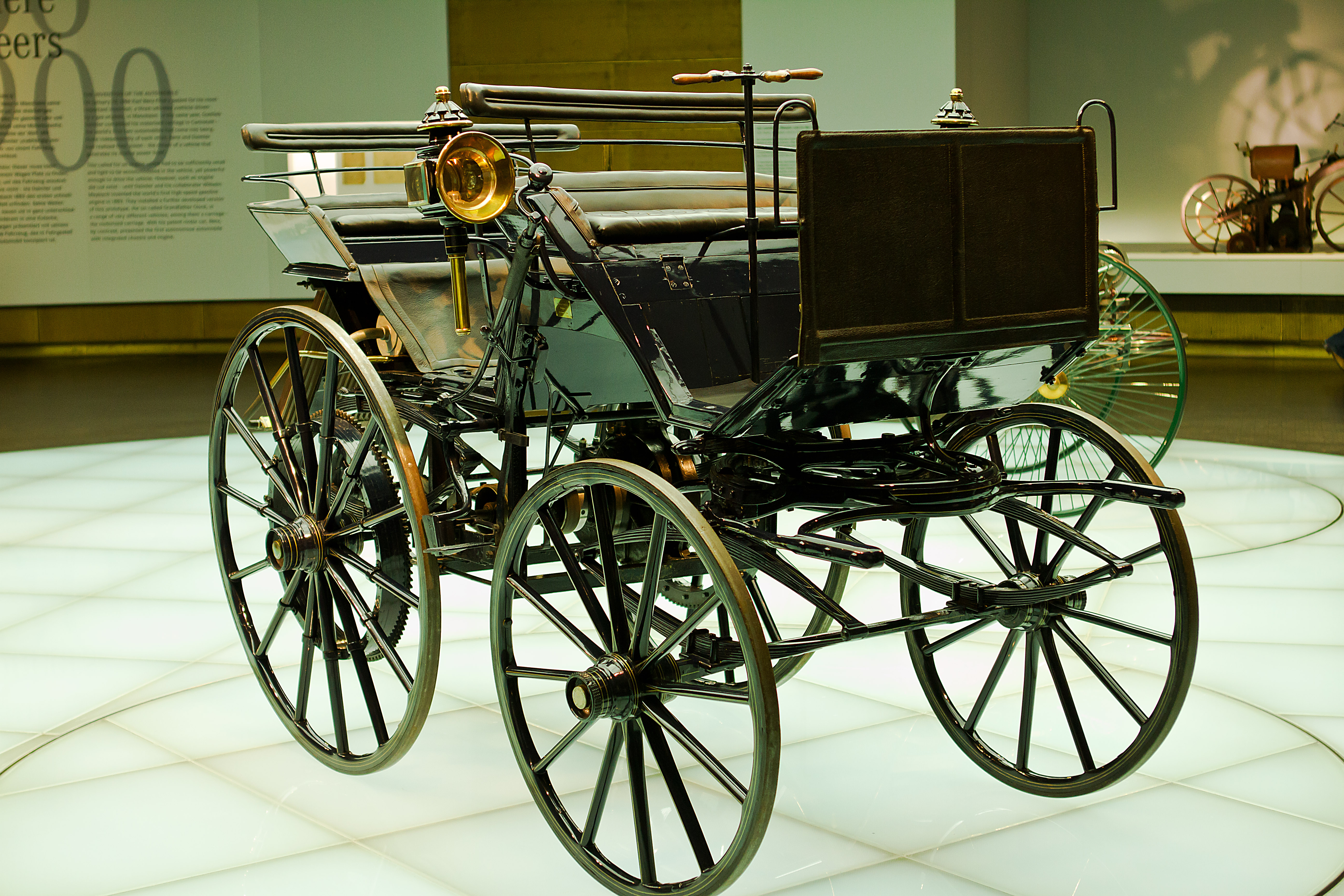 Hier sehen sie das erste Auto der Welt im Mercedes-Benz Museum.